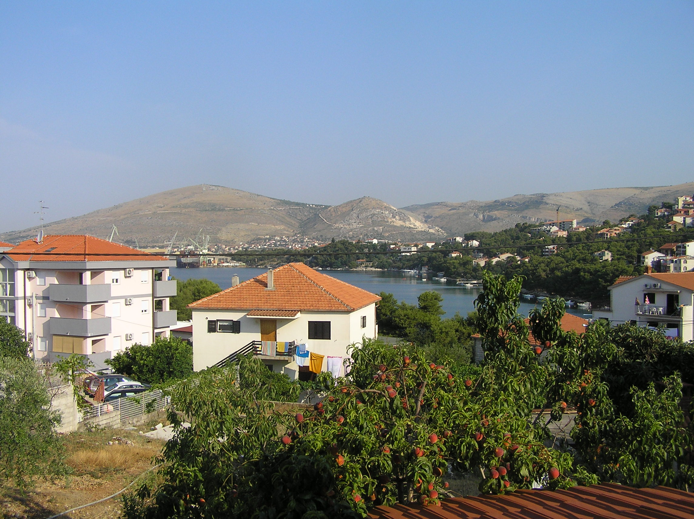 Okrug Gornji, Čiovo island